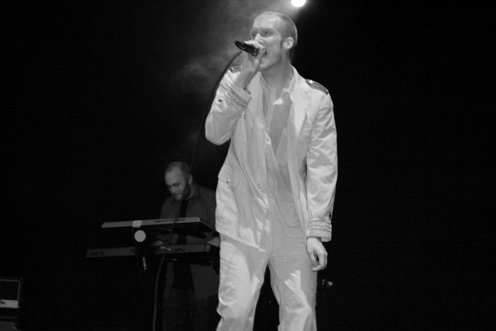 Kapten Röd live